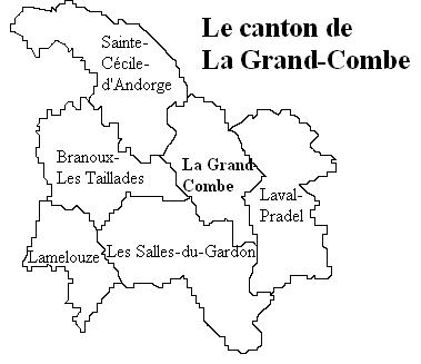 Le canton de la Grand-Combe Image personnelle